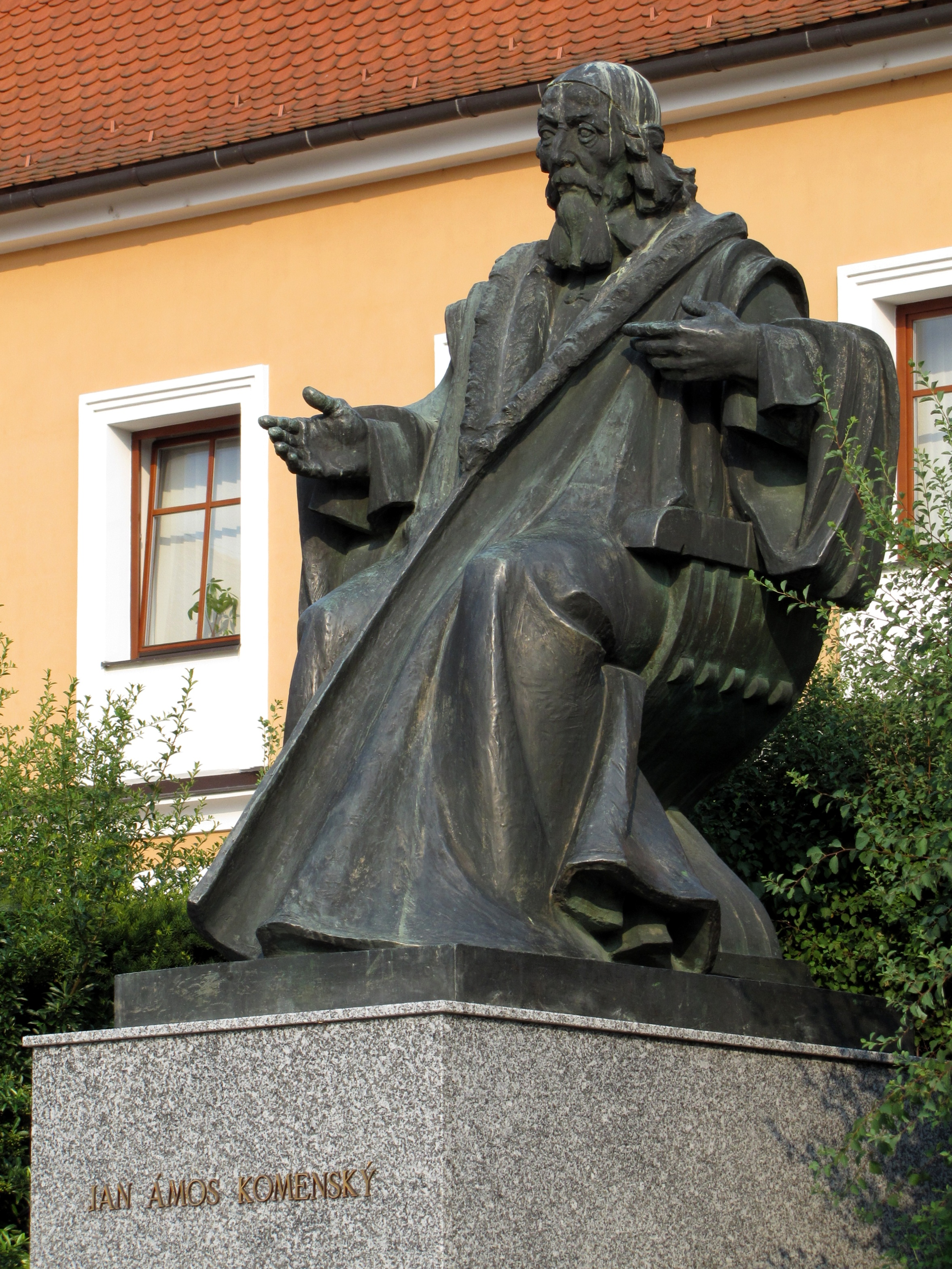 2,2 metrů vysoká bronzová socha J.A. Komenského od strážnického rodáka, akademického sochaře Miroslava Hudečka. Byla odhalena 28.3.1984 v den 392. výročí narození Komenského a při příležitosti 380. výročí jeho příchodu do Strážnice. Komenský se jako dvanáctiletý v roce 1604 přistěhoval do Strážnice ke své tetě Zuzaně a navštěvoval zde bratrskou školu. V květnu 1605 byla Strážnice vypálena Bočkajovci. Byl zabit i Komenského strýc a shořel jeho dům. Poté se Komenský vrátil do Nivnice.